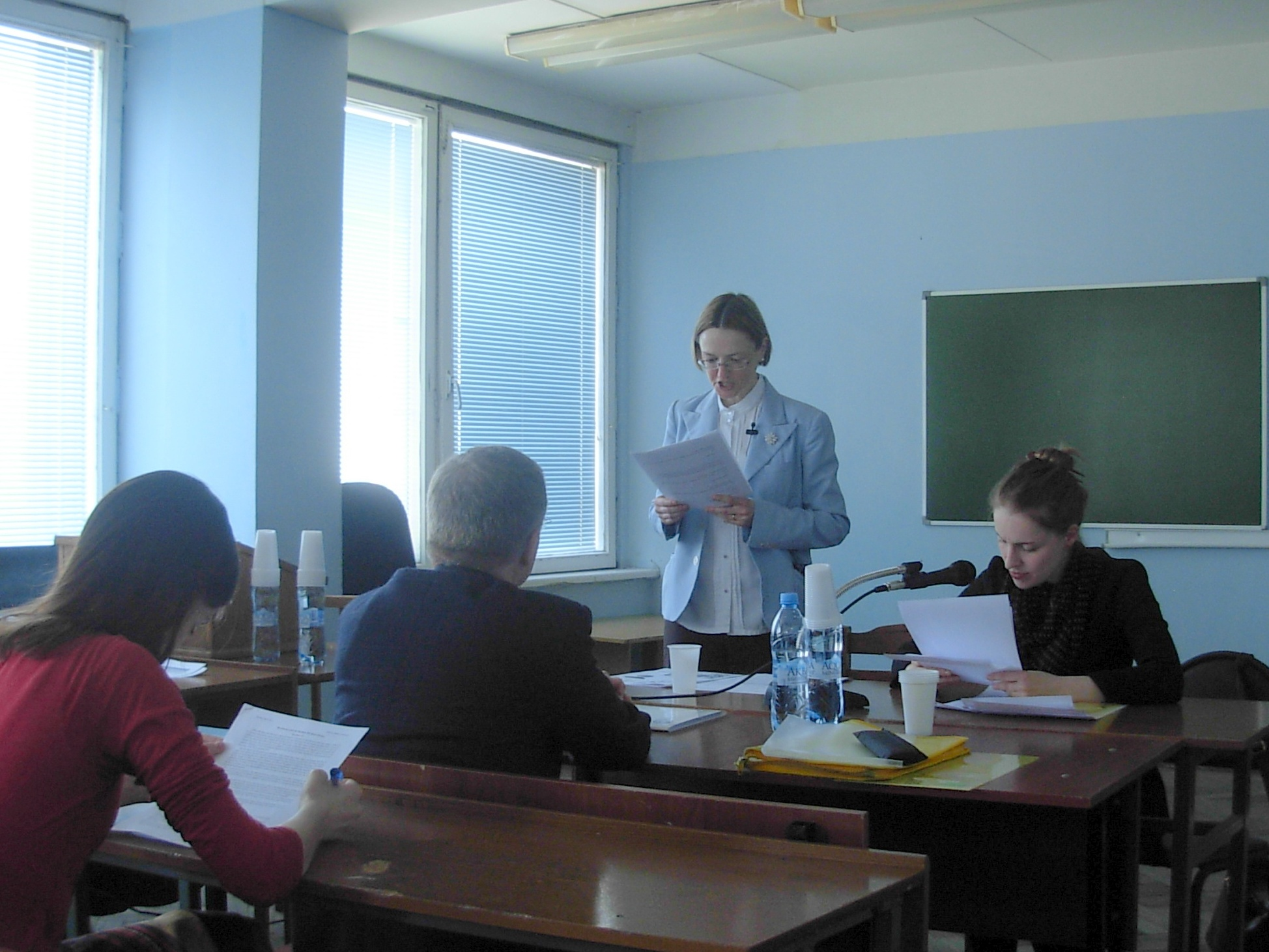 Бальбина Беблер 19 апреля 2013 года читает лекцию о Геродоте по приглашению кафедры классической филологии МГУ имени М.В. Ломоносова